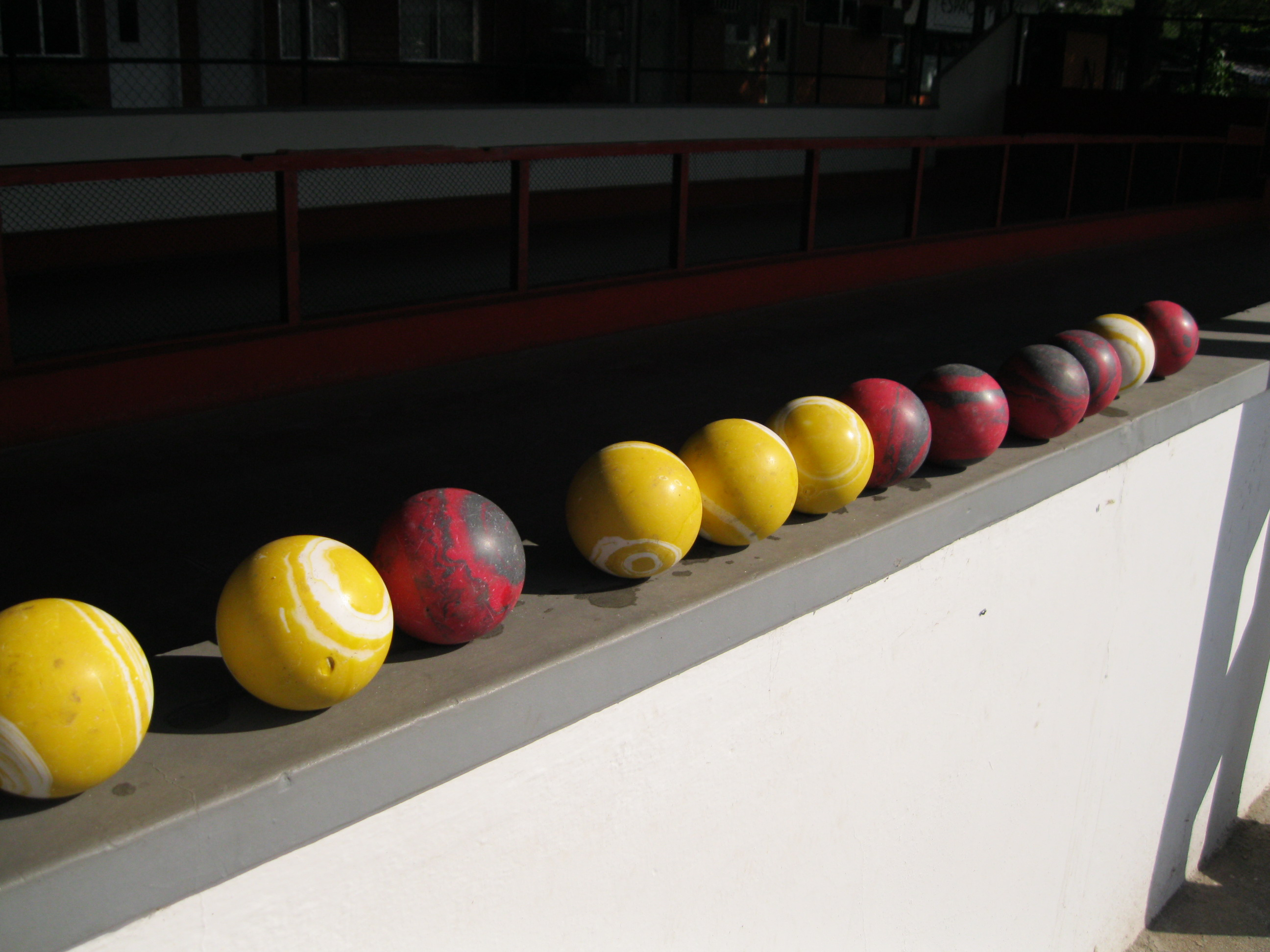 Bochas usadas para a Bocha.